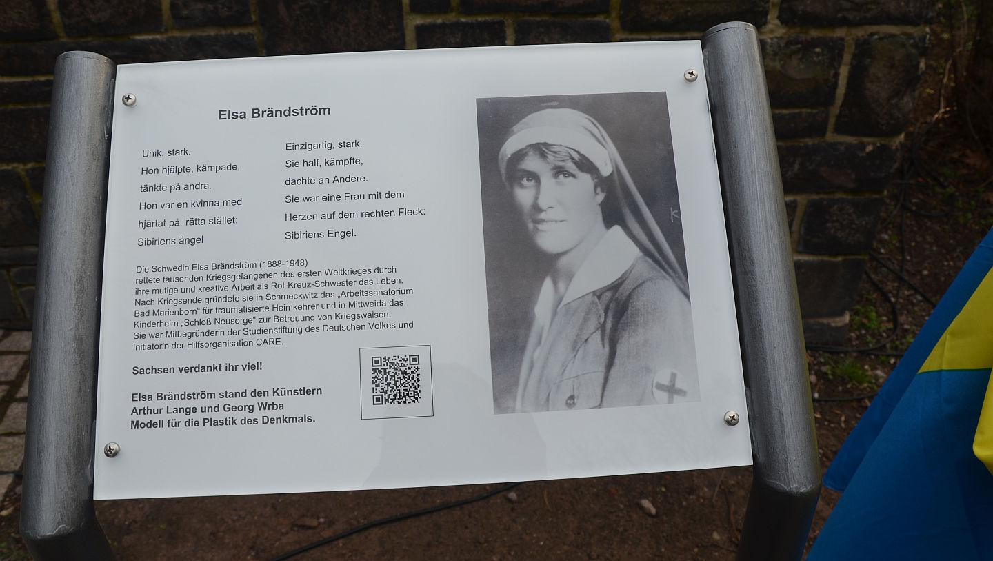 Enthüllung der Brändström-Gedenktafel am 8. März 2016 in Wurzen